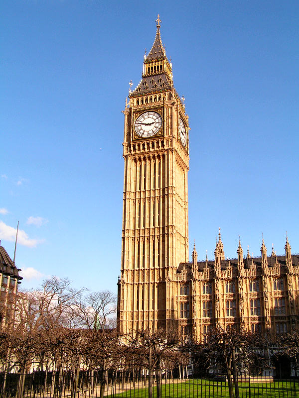 Big Ben in London. Camera: Konica Minolta Dimage Z2